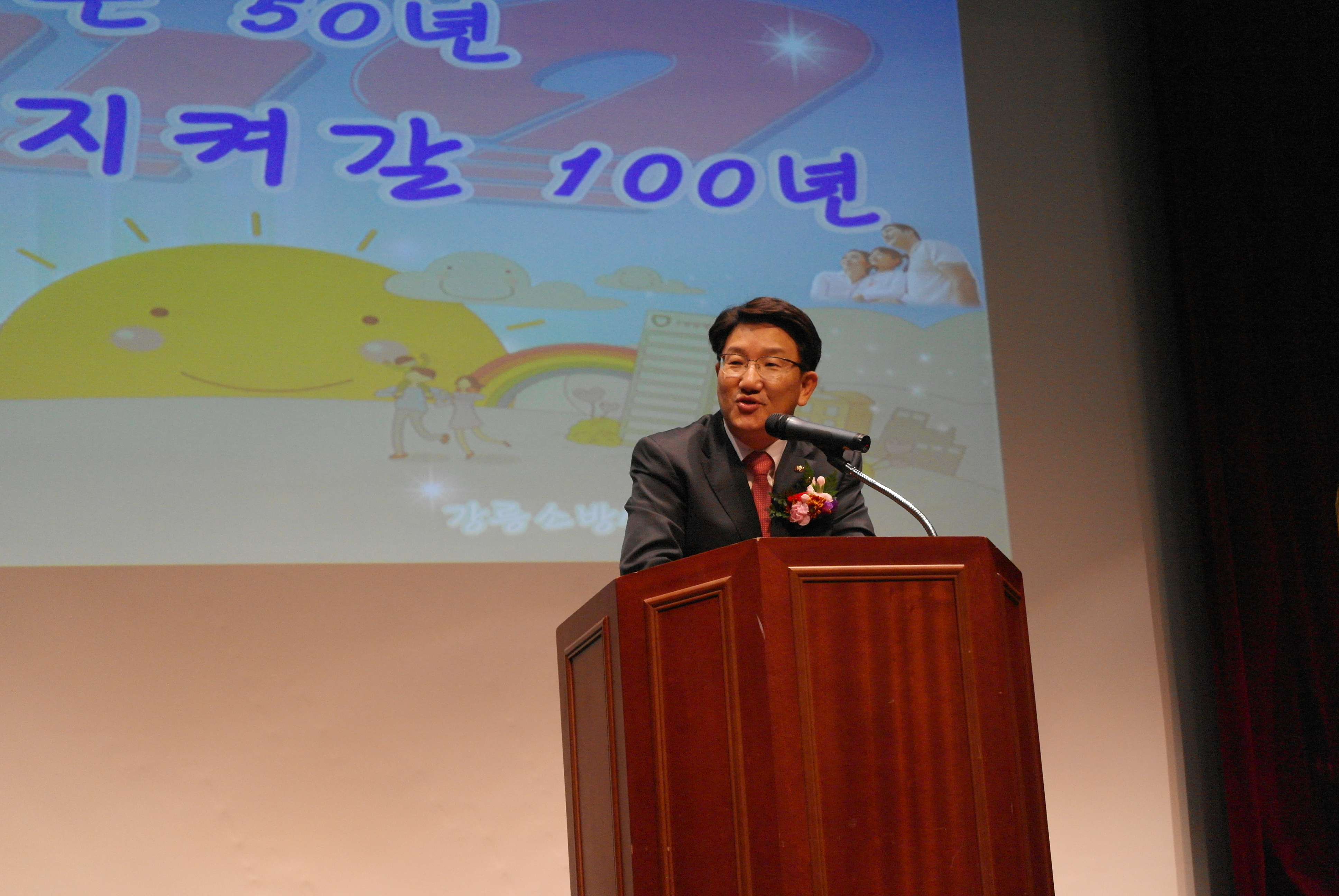 2012년 11월 13일 강릉소방서 제50주년 소방의날 행사